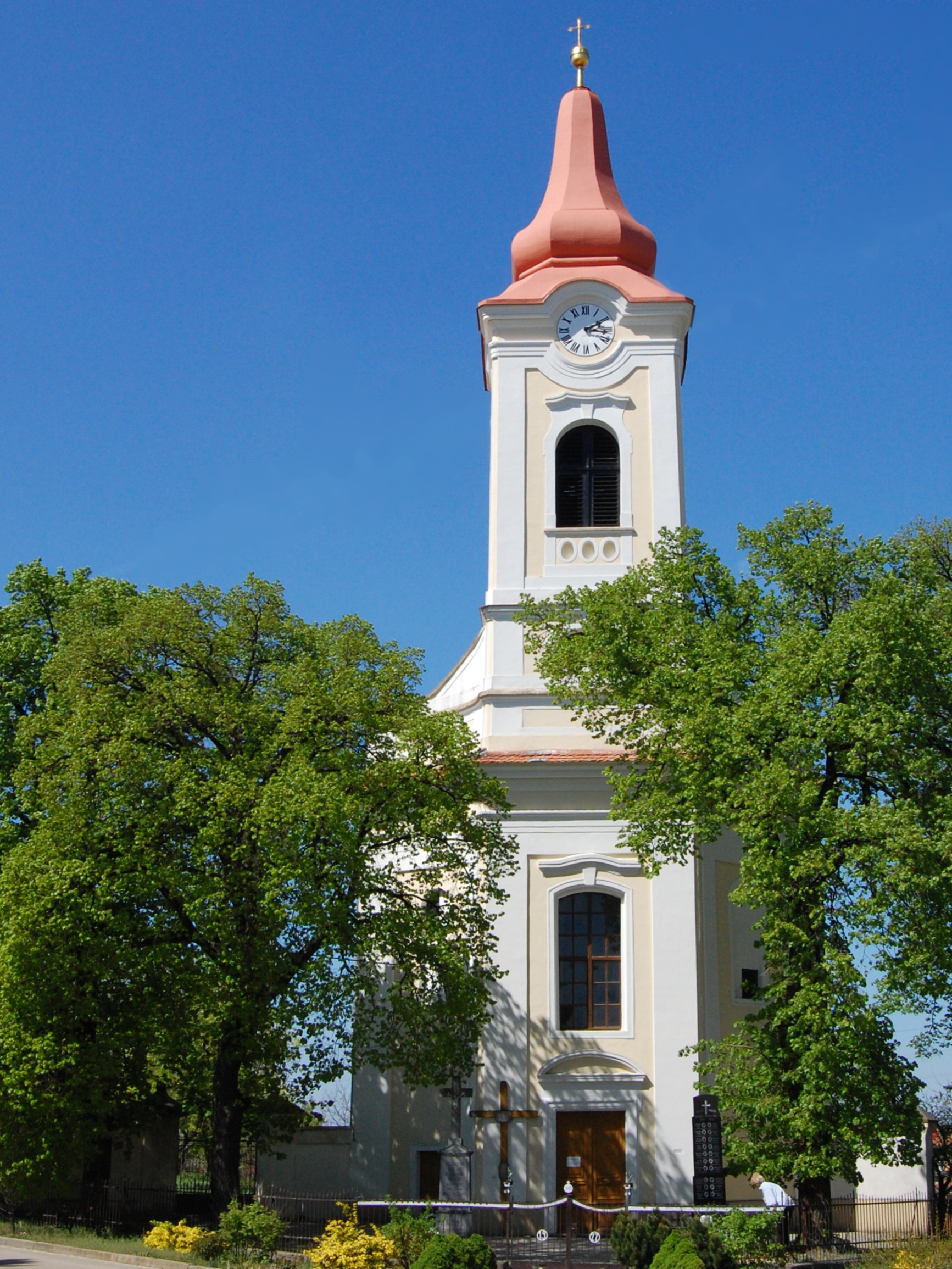 Kostel sv. Jakuba Staršího, Nikolčice